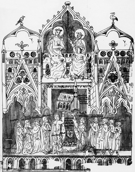 Wandschildering in Klooster Klarenthal met het stichtersbeeld van koning Adolf van Nassau, zijn vrouw Imagina, zeven zonen en drie dochters. Tekening uit het Epitaphienbuch, Heinrich Dors, 1632. Het toont in het midden een baldakijn met een vergroot voorgesteld, tronend, gekroond heiligenpaar met nimbus, dat als Christus en Maria beschouwd wordt. Christus, die in zijn linkerhad een gesloten boek houdt, wijst met de rechterhand naar zijn moeder, die haar rechterhand in aanbevelingsgebaar op het door het stichterspaar omhoog gereikte kerkmodel richt. Het kerkmodel wordt door een opschrift met gebeds- en bijbeltekst omrand. Het onderste deel van het beeld wordt door het stichterspaar en zijn gezin gevuld, die staand dan wel knielend in gebed afgebeeld zijn. In het midden staat links Imagina in lang gewaad met sluier, rechts voor haar haar naamopschrift, achter haar de eveneens met opschrift aangeduide drie dochters, met aan het eind zoon Walram. Aan de voeten van de moeder knielen de beide jonggestorven zonen Adolf en Walram. De met een hermelijnen mantel getooide koning Adolf knielt aan de rechterzijde en was rechts naast het kerkmodel met een naamopschrift aangeduid; vlak boven zijn hoofd noteerde Dors het jaar en streepte de naam door. Adolfs zonen droegen eveneens hun namen boven hun hoofden. Tussen het echtpaar een wapenschild, daaronder hun beide kronen.